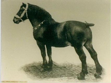 Spirou, étalon ardennais de type carrossier, champion international de sa race à Paris en 1900